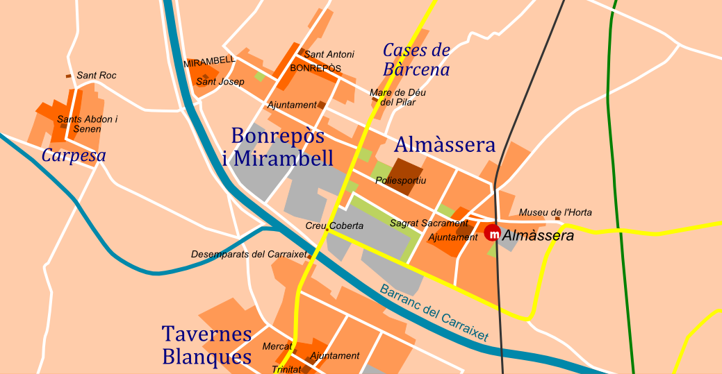 Plànol d'accessos a Almàssera, Bonrepòs i Mirambell, Cases de Bàrcena, Carpesa i Tavernes Blanques.